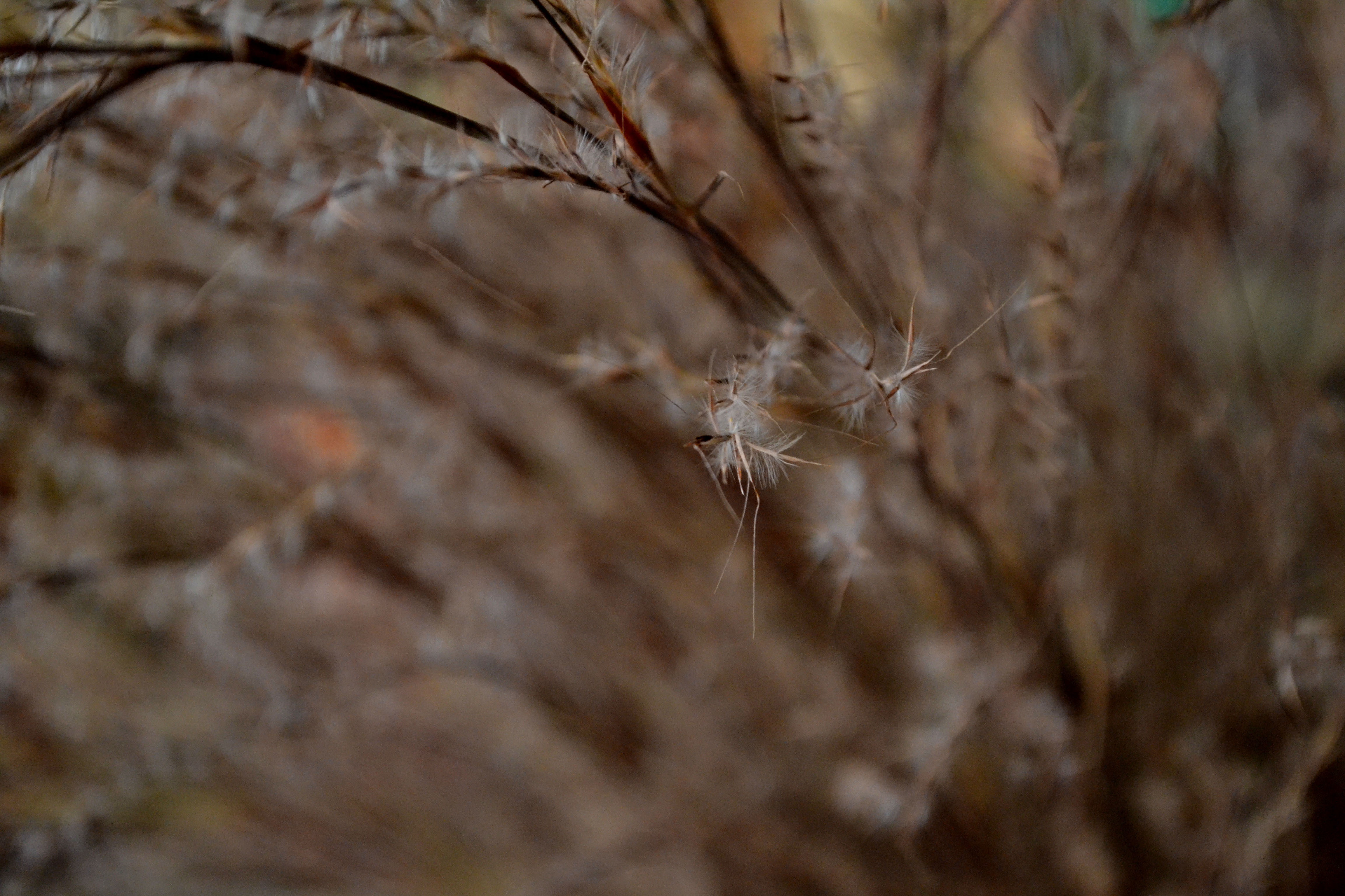 Pomiar centralny